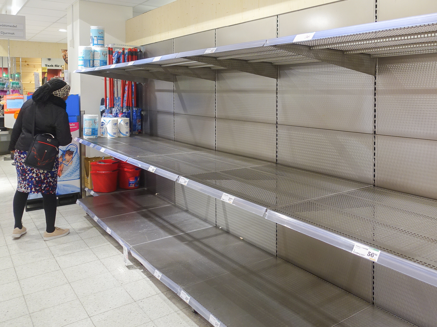 Tomma livsmedelshyllor efter att oroliga konsumenter hamstrat varor under Coronakrisen 2020.